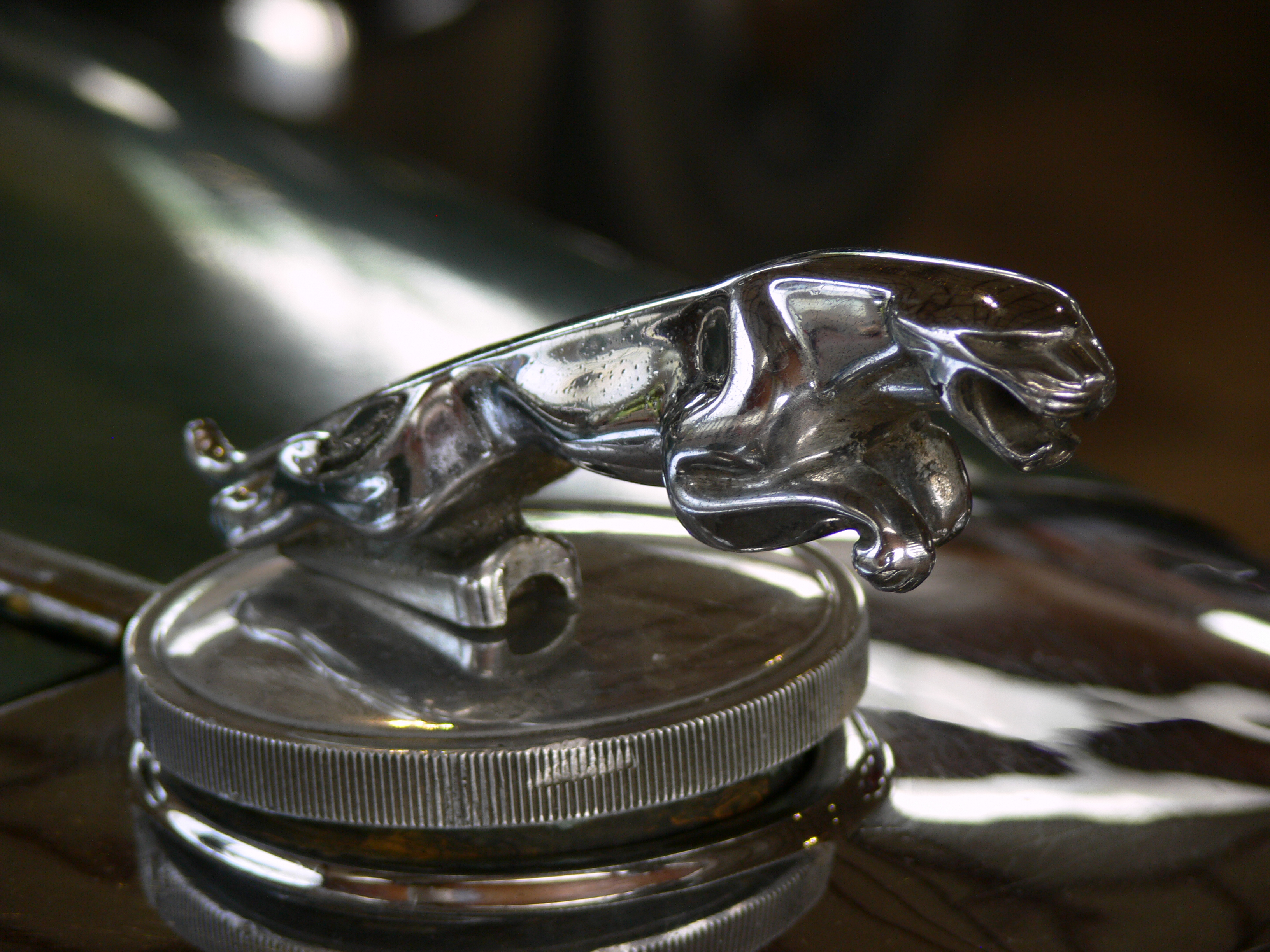 Soška vozu Jaguar, Veteran Motor Show Praha 2007